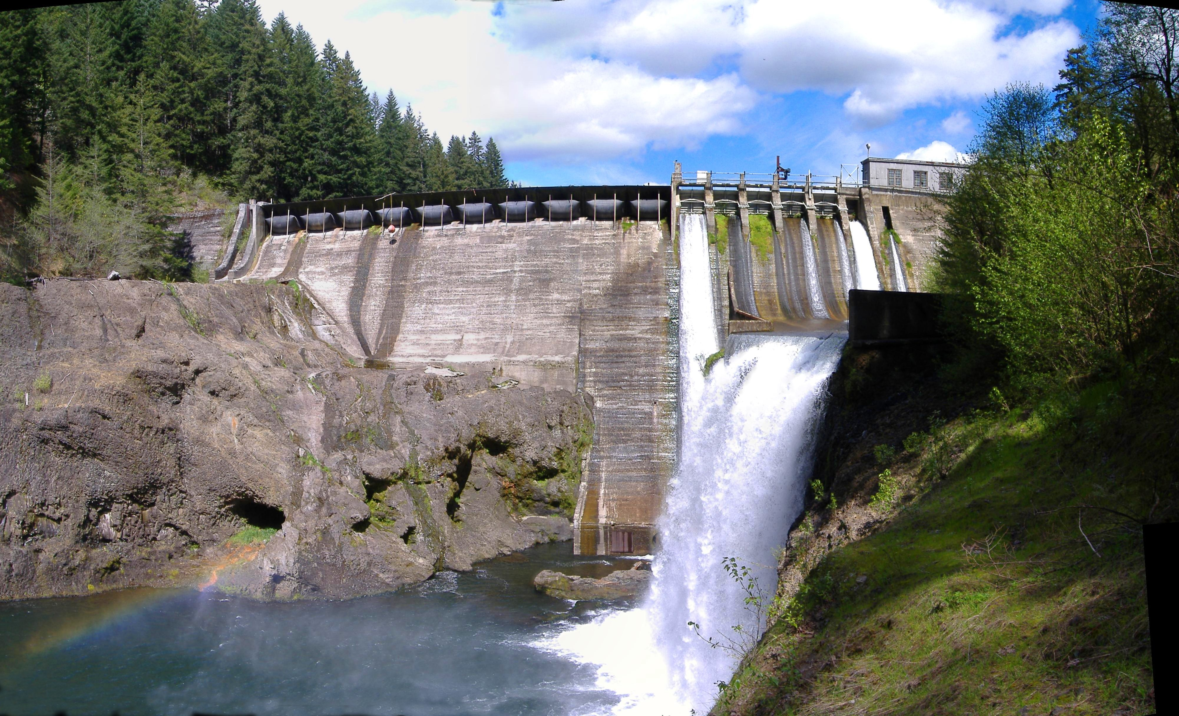 Condit Dam